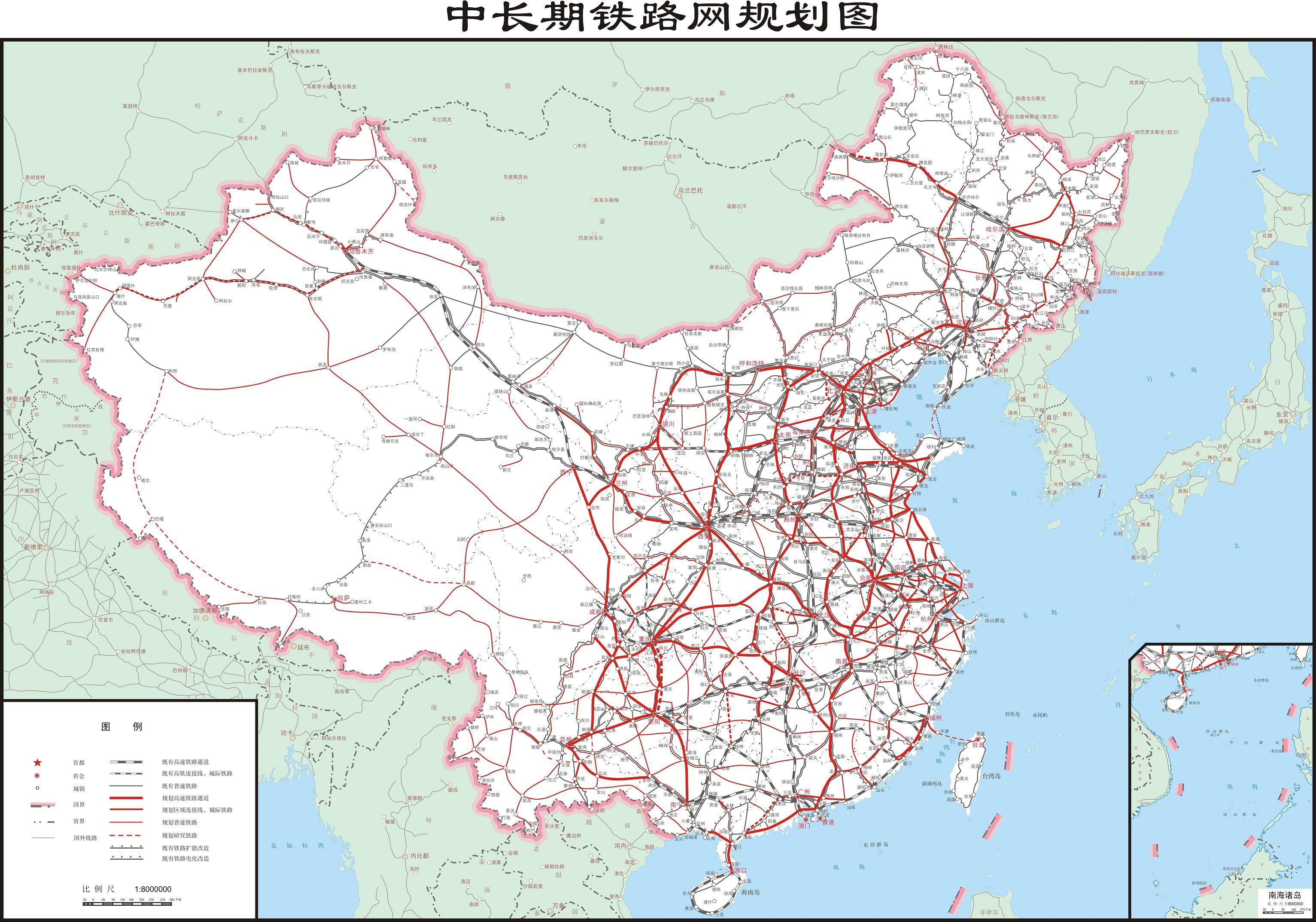 《中长期铁路网规划》附件1（2016年7月13日国家发展改革委、交通运输部、中国铁路总公司《关于印发〈中长期铁路网规划〉的通知》印发。）